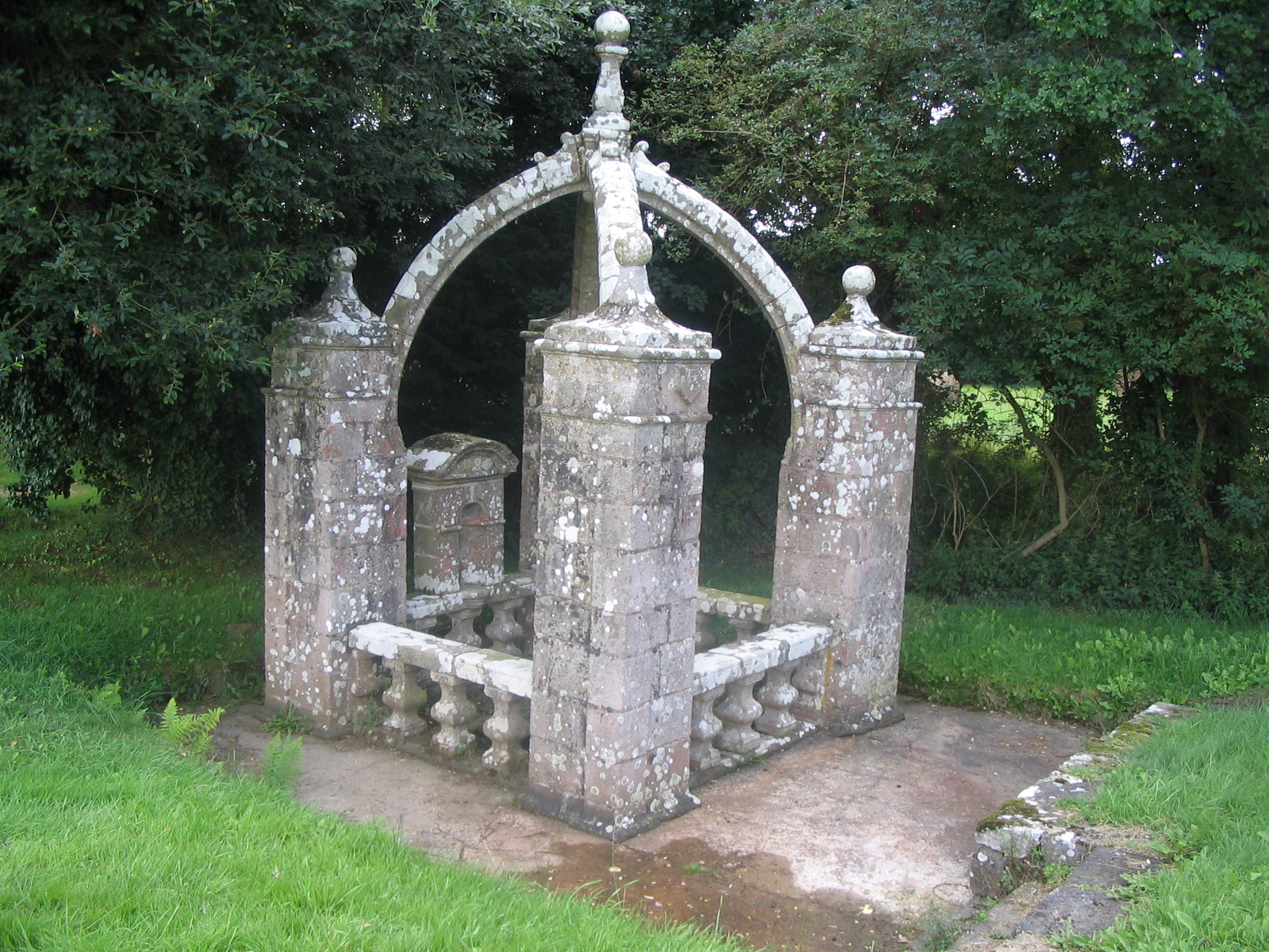 Radenac - Morbihan - France - Fontaine_St_Fiacre XII èeme siècle.